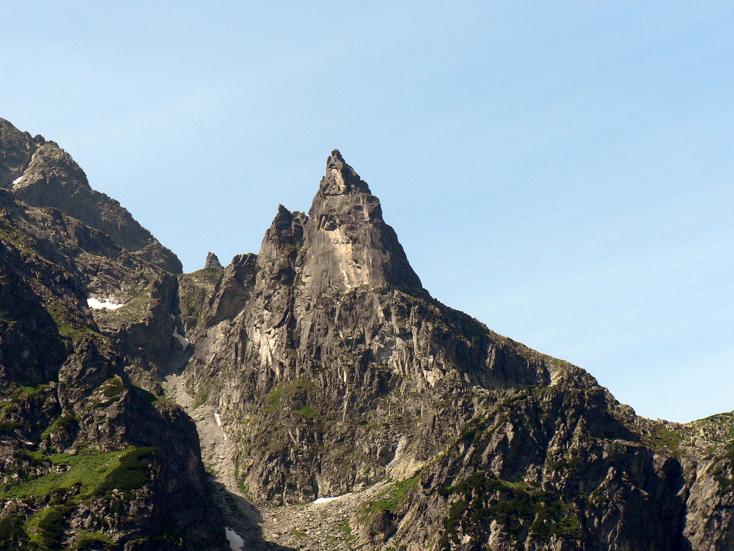 Mnich znad Morskiego Oka